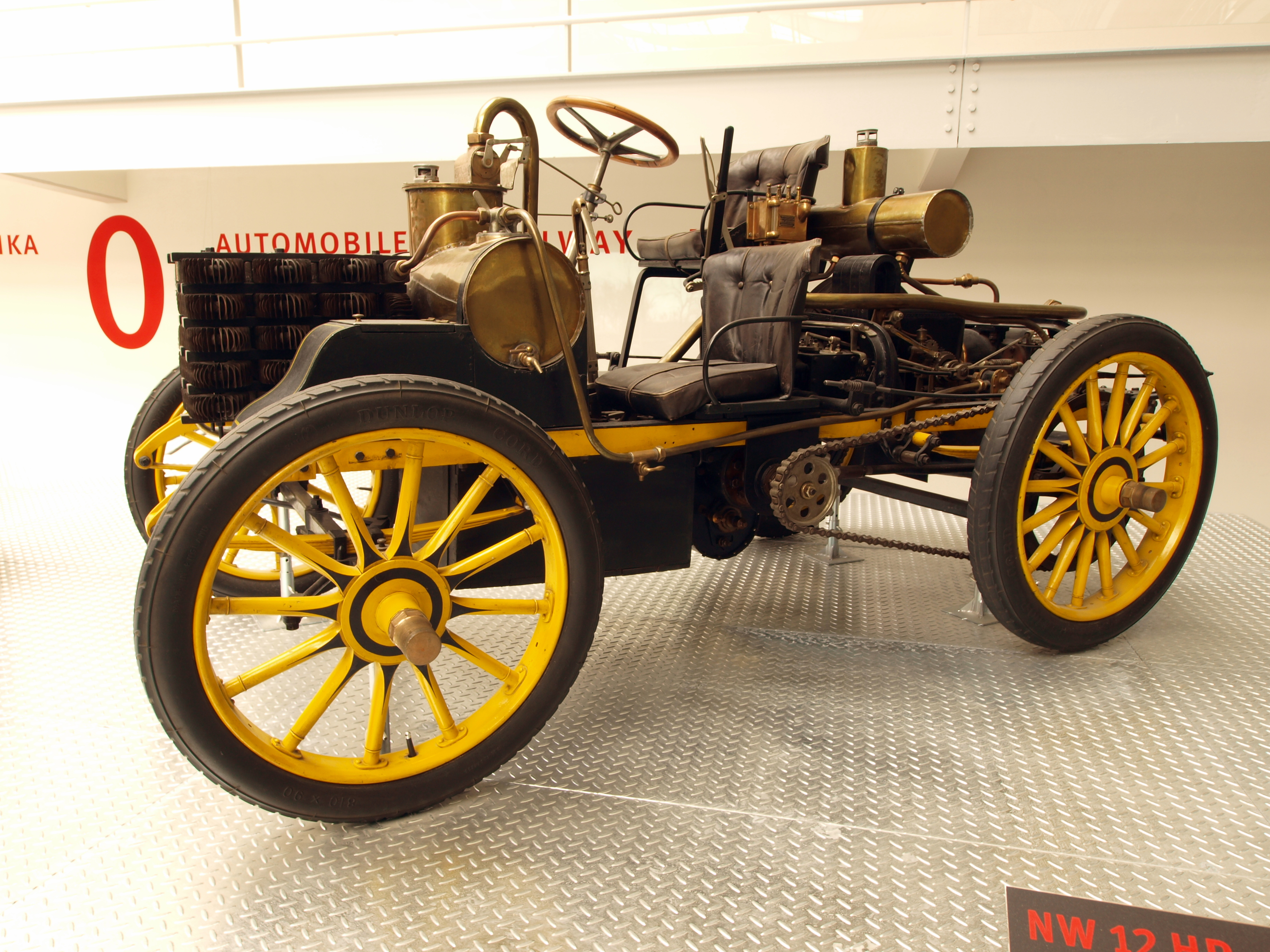 1900 NW 12 HP Rennzweier